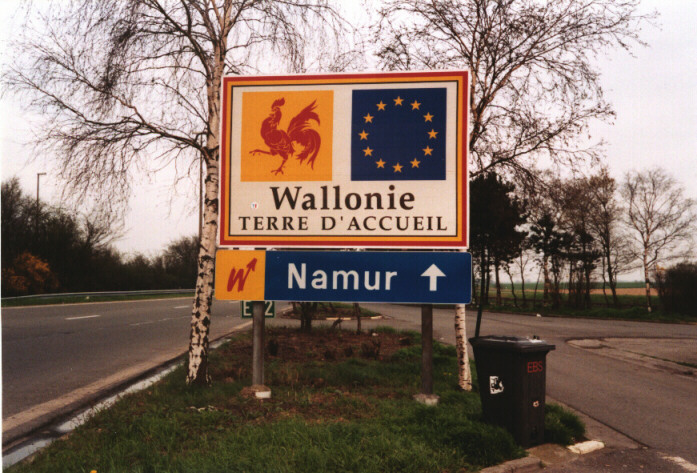 Panneau routier à la frontière belgo-française